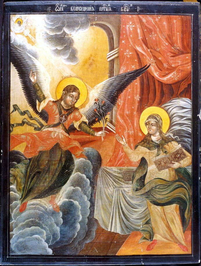 Икона Благовещение Пресвятой Богородицы. 1700 – 1750, Санкт-Петербург (?)